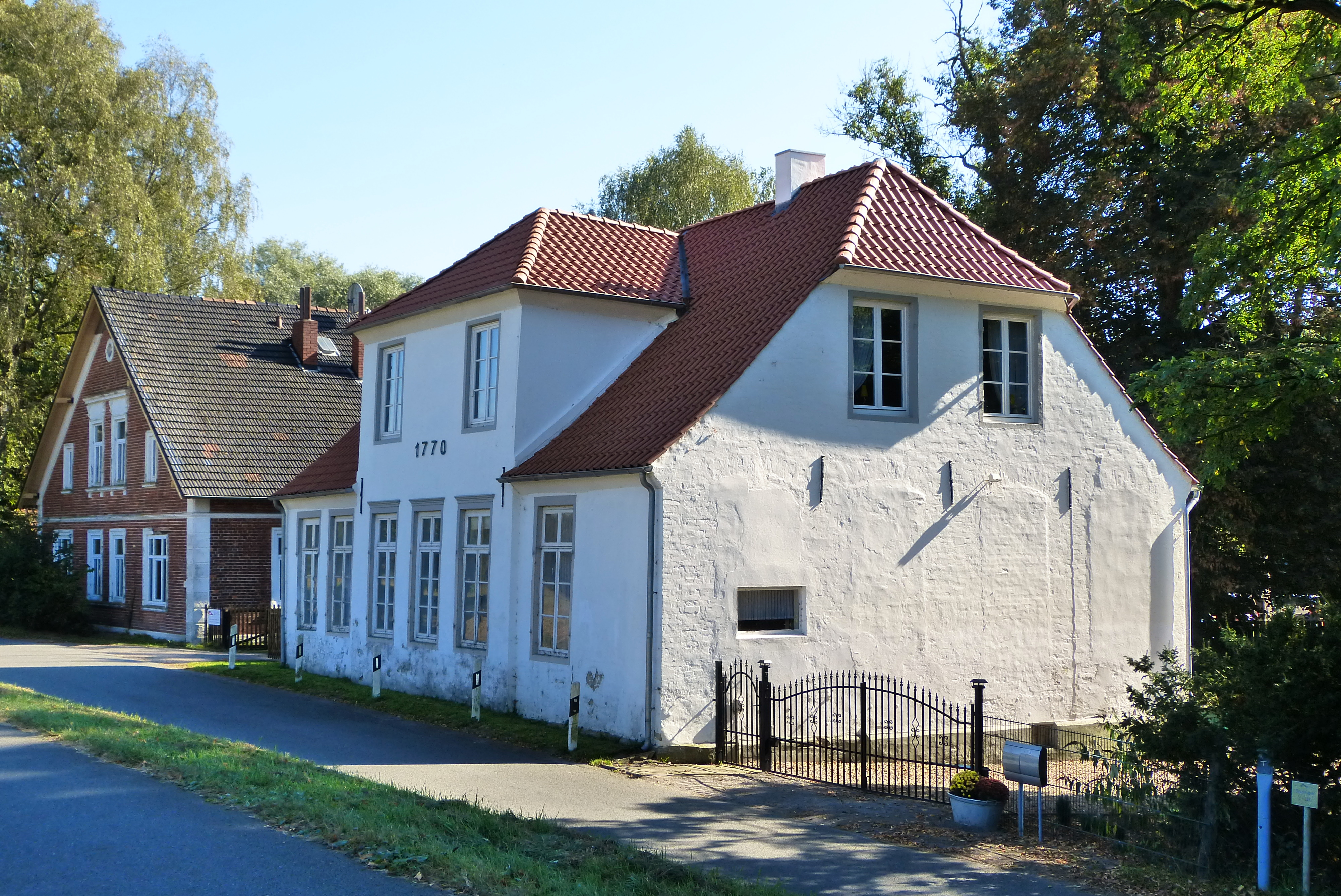 Doktorhaus (Westgiebel) in Bremen, Lesumbroker Landstraße 110Das abgebildete Objekt ist ein geschütztes Kulturdenkmal in der Freien Hansestadt Bremen, mit der Nr. 1297 beim Landesamt für Denkmalpflege registriert.